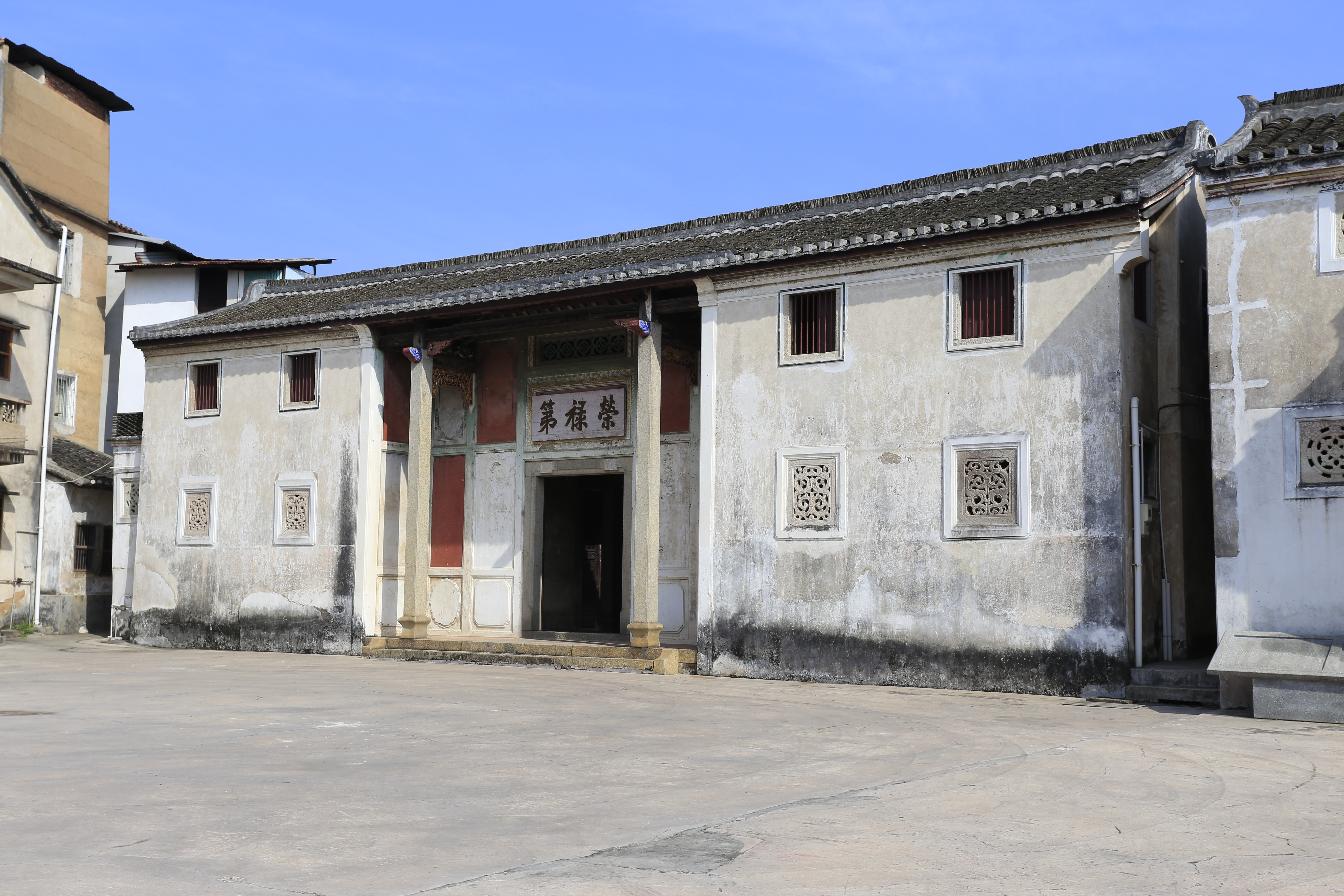 梅州市梅江区黄遵宪纪念馆（人境庐、荣禄第、恩元第）—— 荣禄第